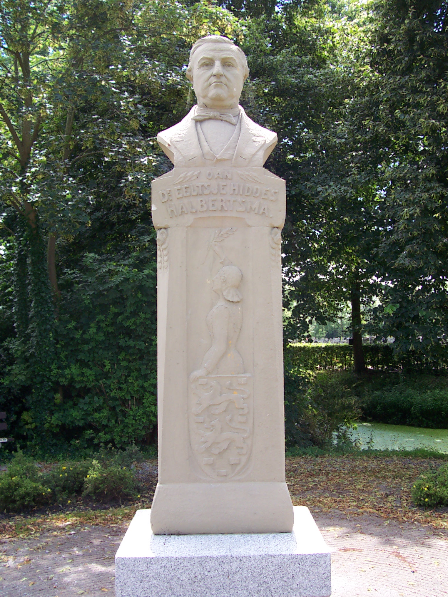 Grou, Dr. Eeltsje Halbertsma Earebyld